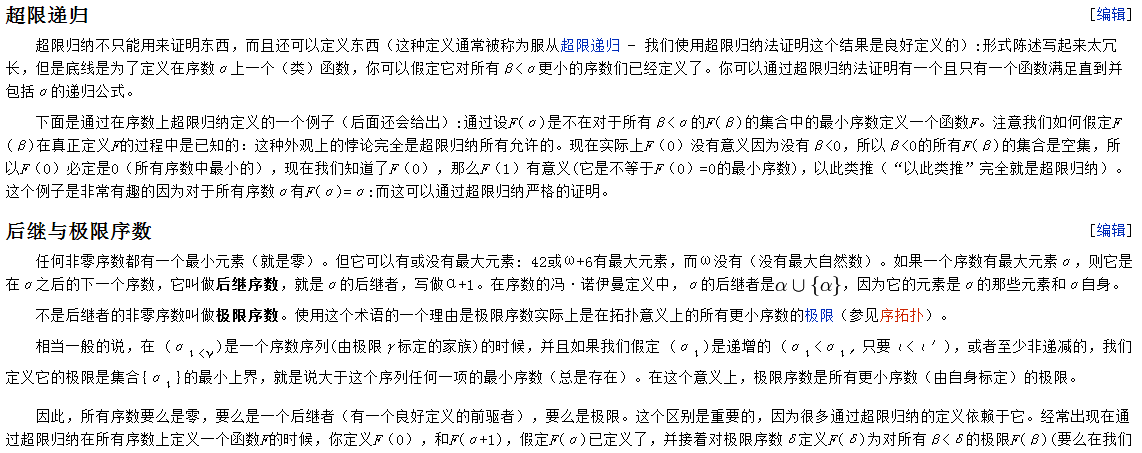 序数#超限遞歸